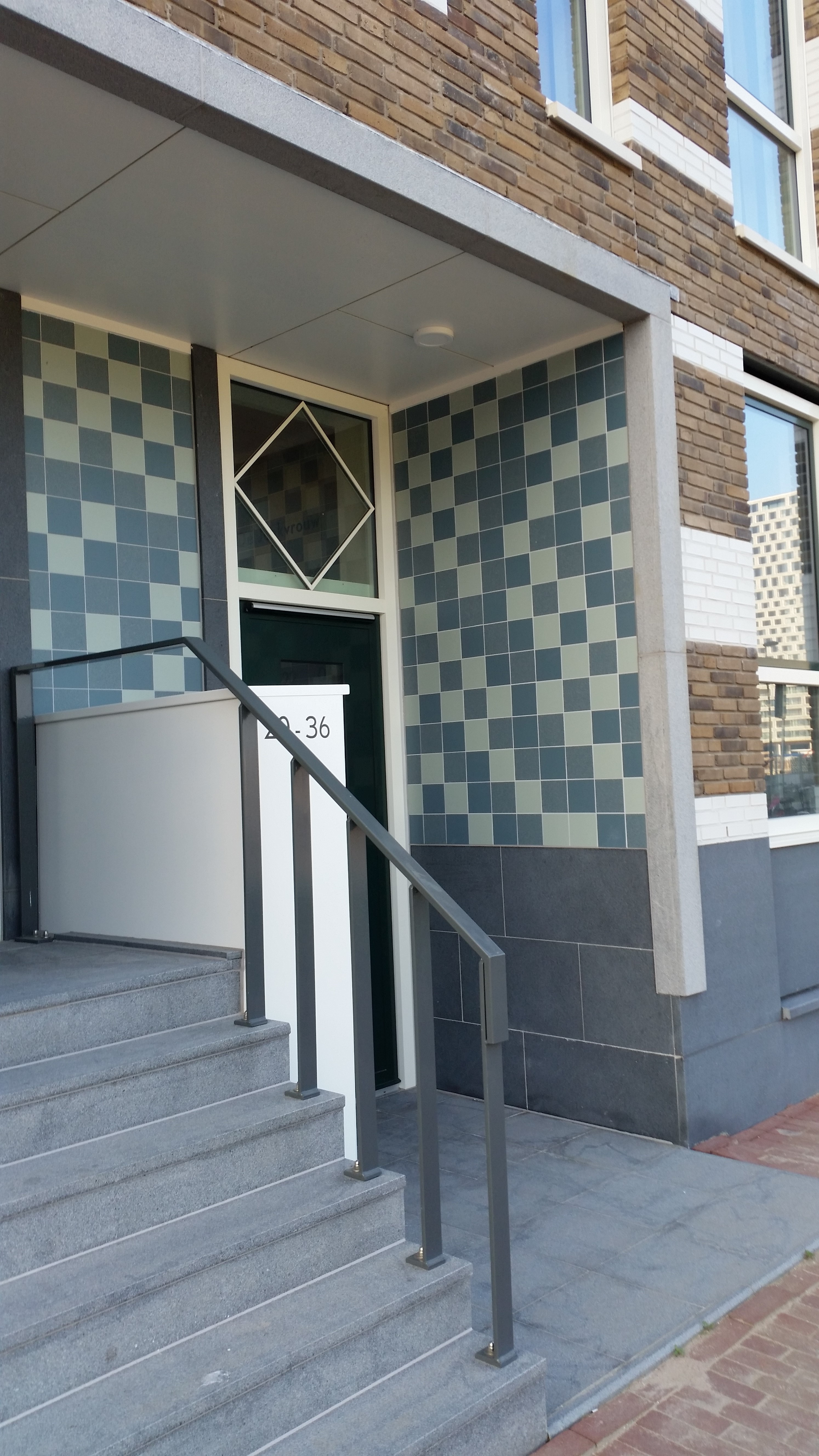 Tegelwerk van portiek aan het Memeleiland, Amsterdam